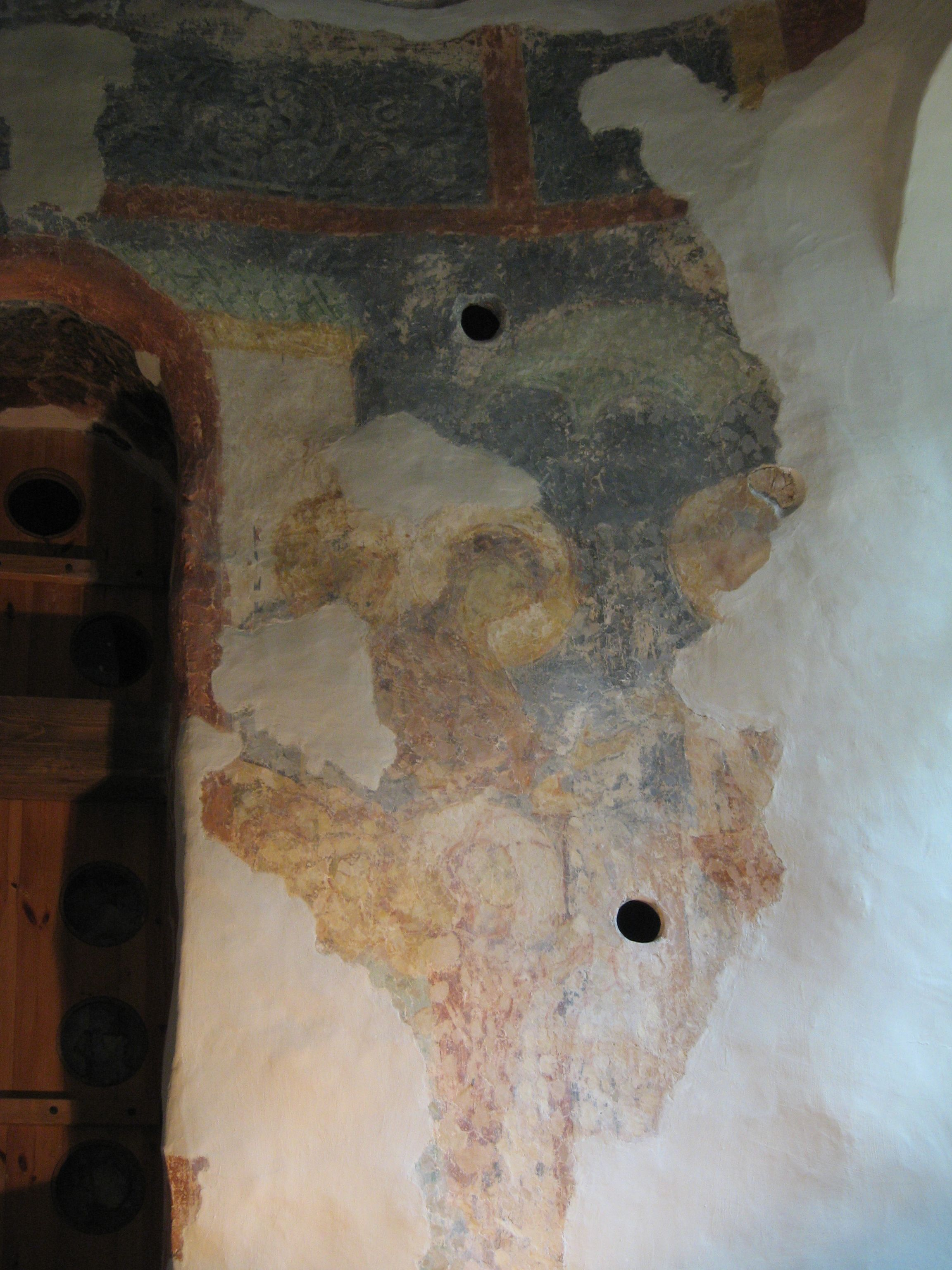 Фрески жертвенника собора Антониева монастыря в Великом Новгороде.